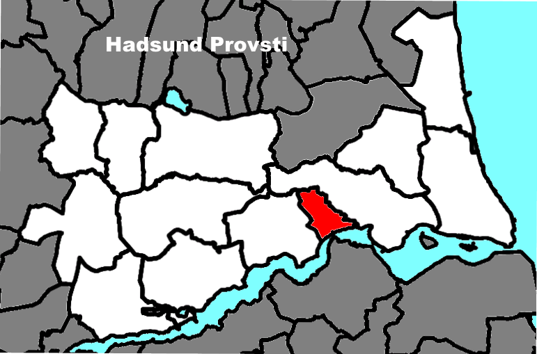 Sognets beliggenhed i Hadsund Provsti.